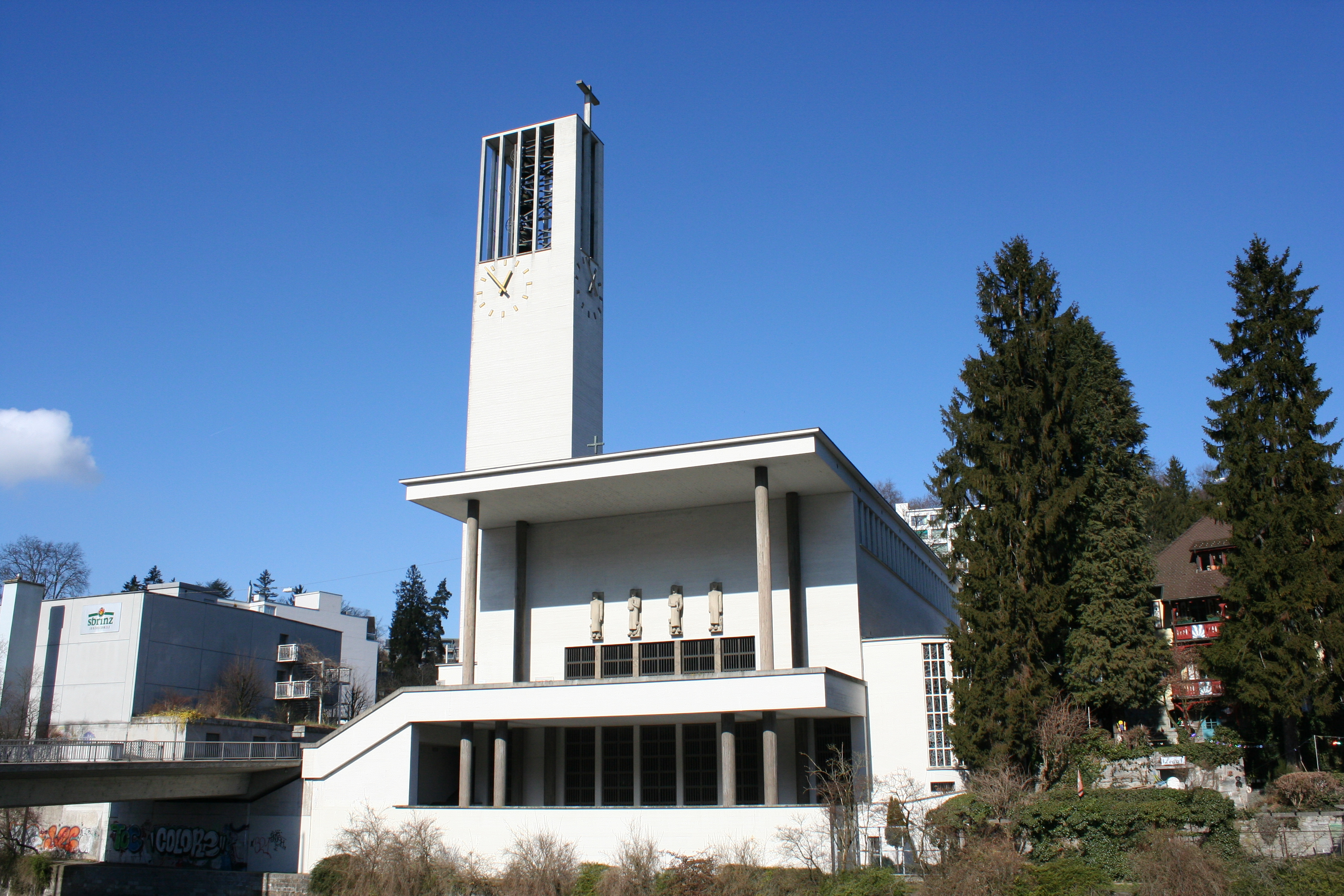 Römisch-katholische Pfarrkirche Sankt Karl Luzern